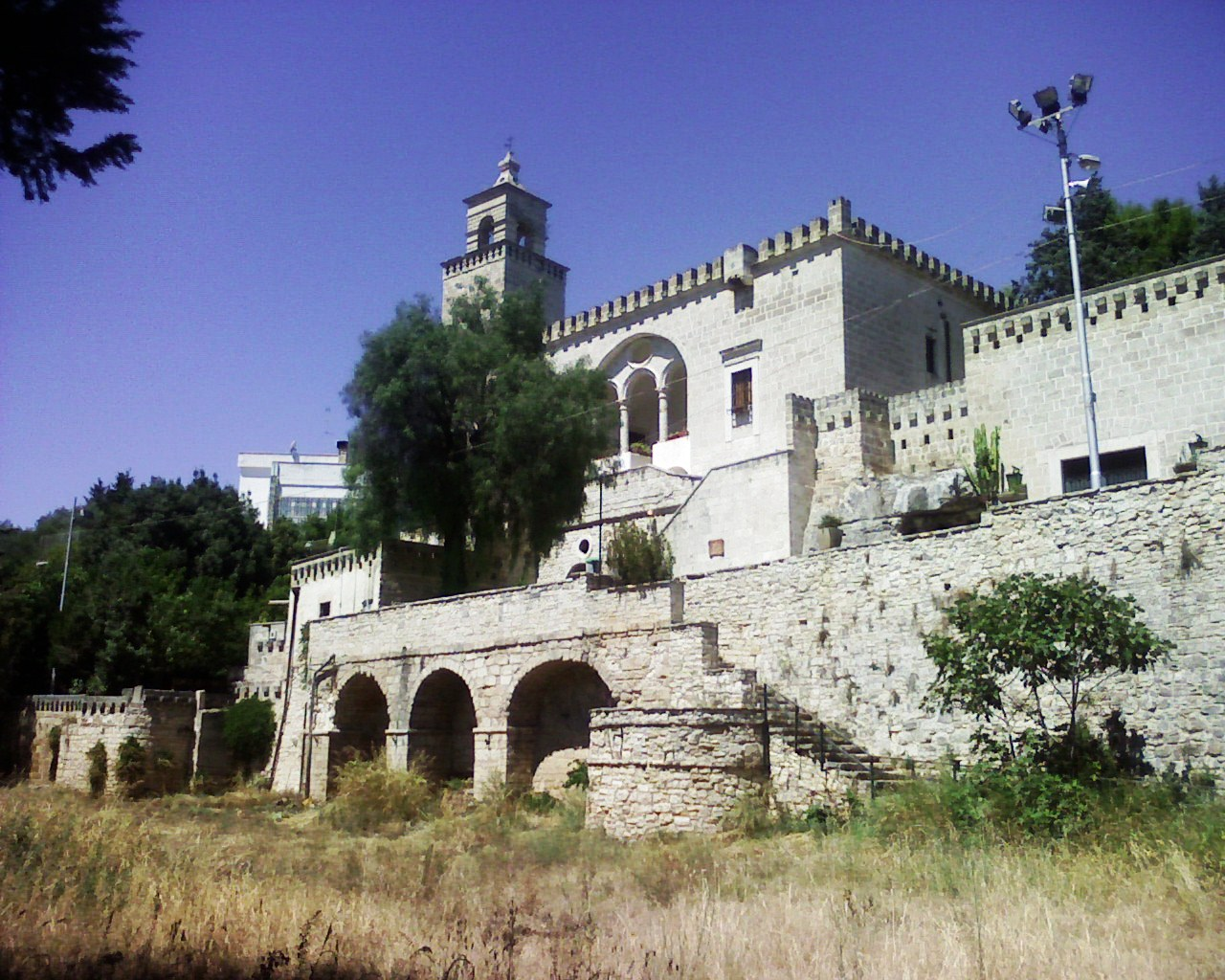 Santuario di Santa MAria della grotta - Modugno (bari)-Italy